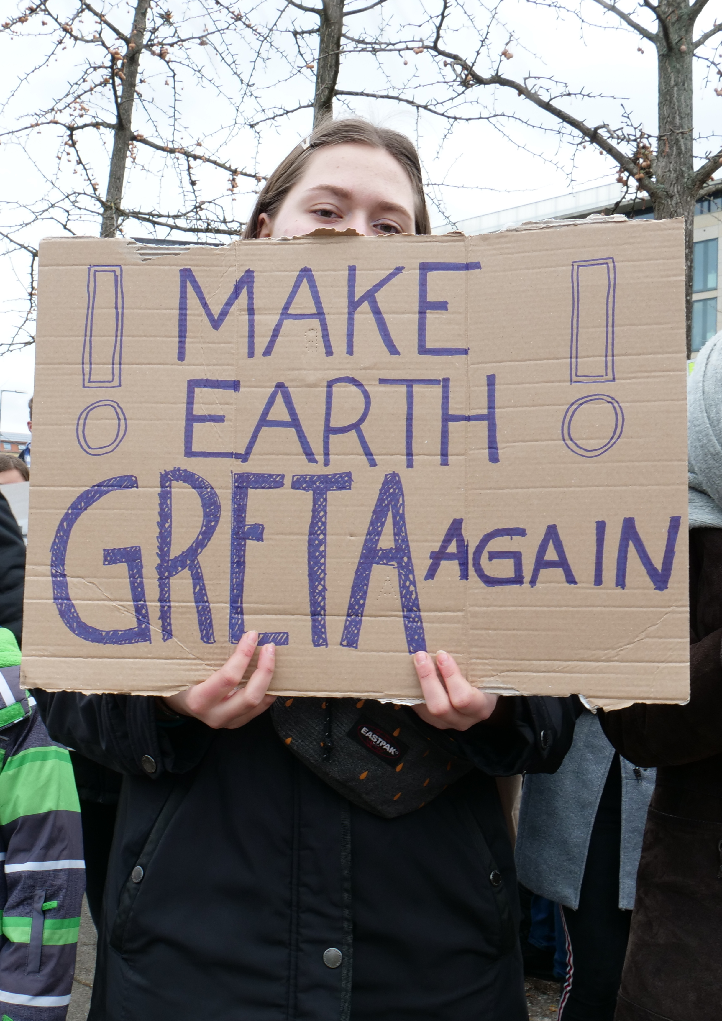 FridaysForFuture Demonstration am 8. Februar 2019 im Invalidenpark in Berlin.